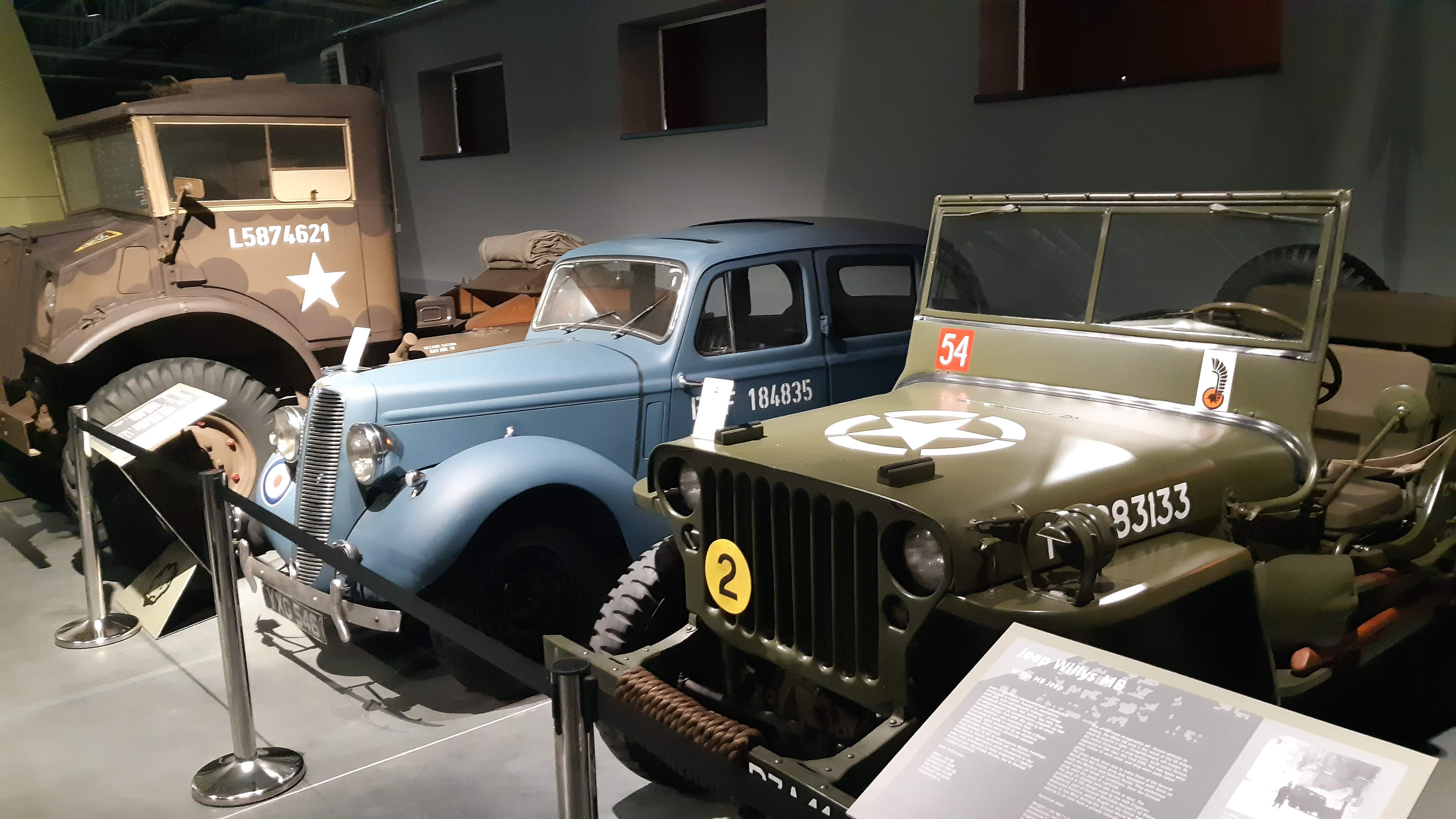 Muzeum Broni Pancernej w Poznaniu. Na pierwszym planie Jeep Willys MB